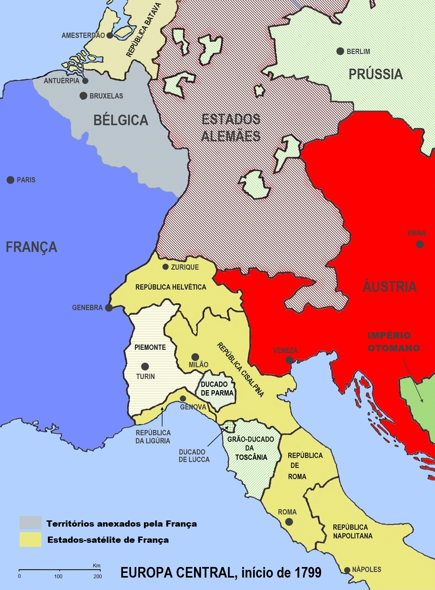 Situação política da Europa em 1799